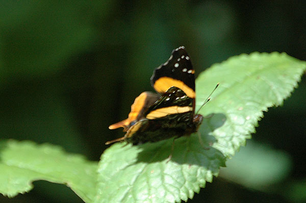 Uganda Mgahinga NP, SW Uganda